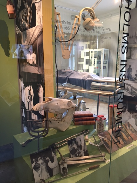 Från veterinärmuseets basutställning